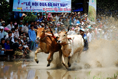 Lễ hội đua bò ở Bảy Núi, Tịnh Biên, An Giang.